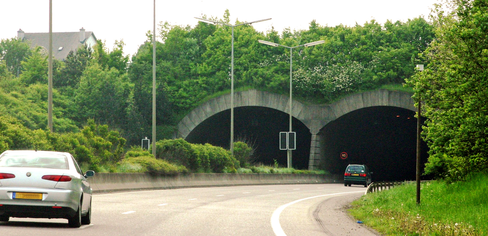 Tunnel Aessen. Aessen Kategorie:Gemeng Suessem